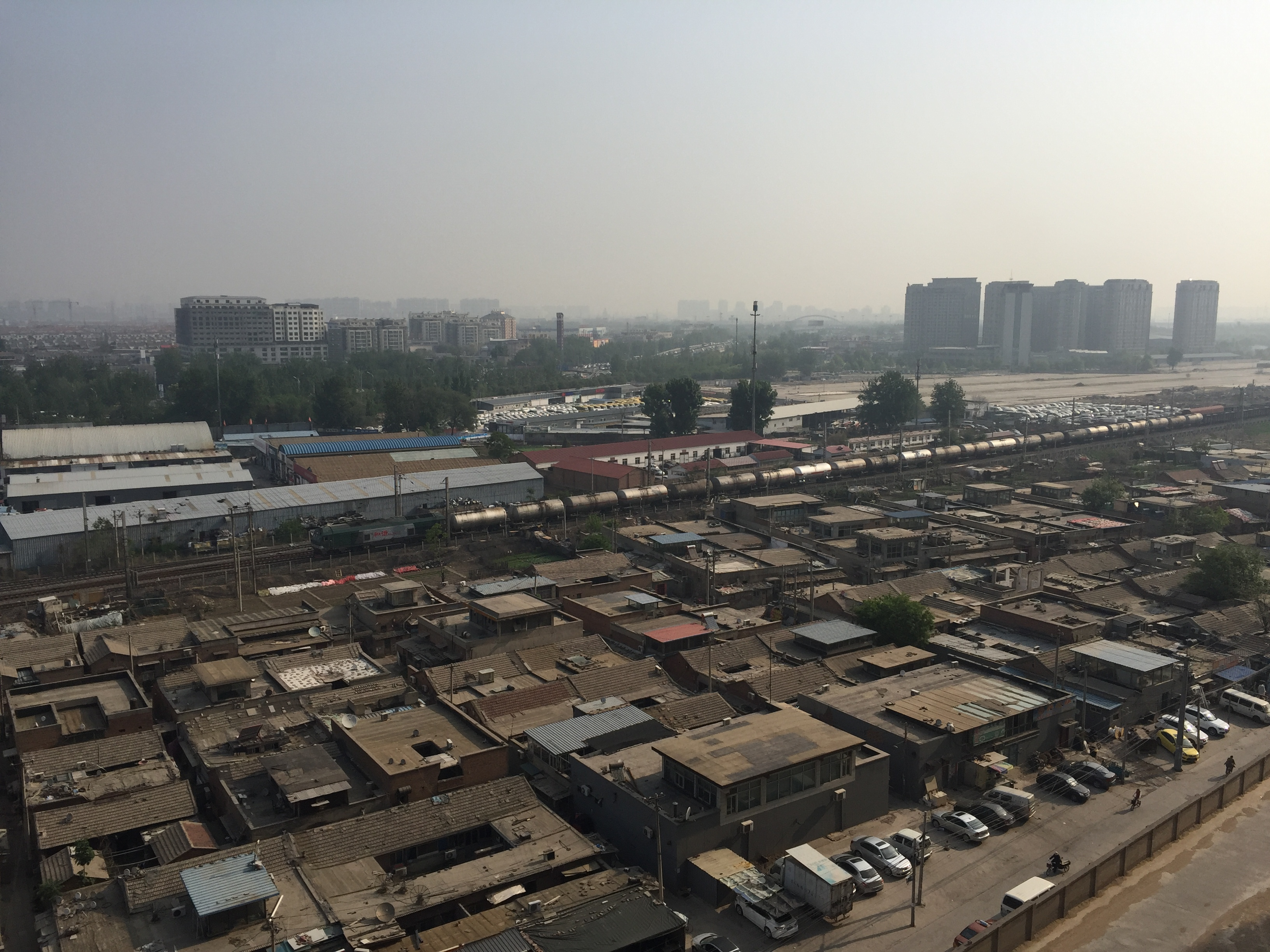 中文（中国大陆）: 罐车经过丰双铁路小红门站